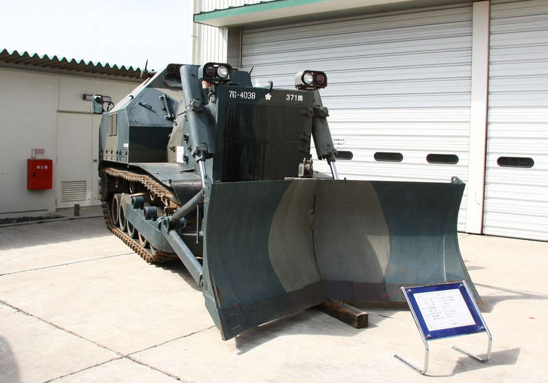 記念式典にて展示される75式ドーザ